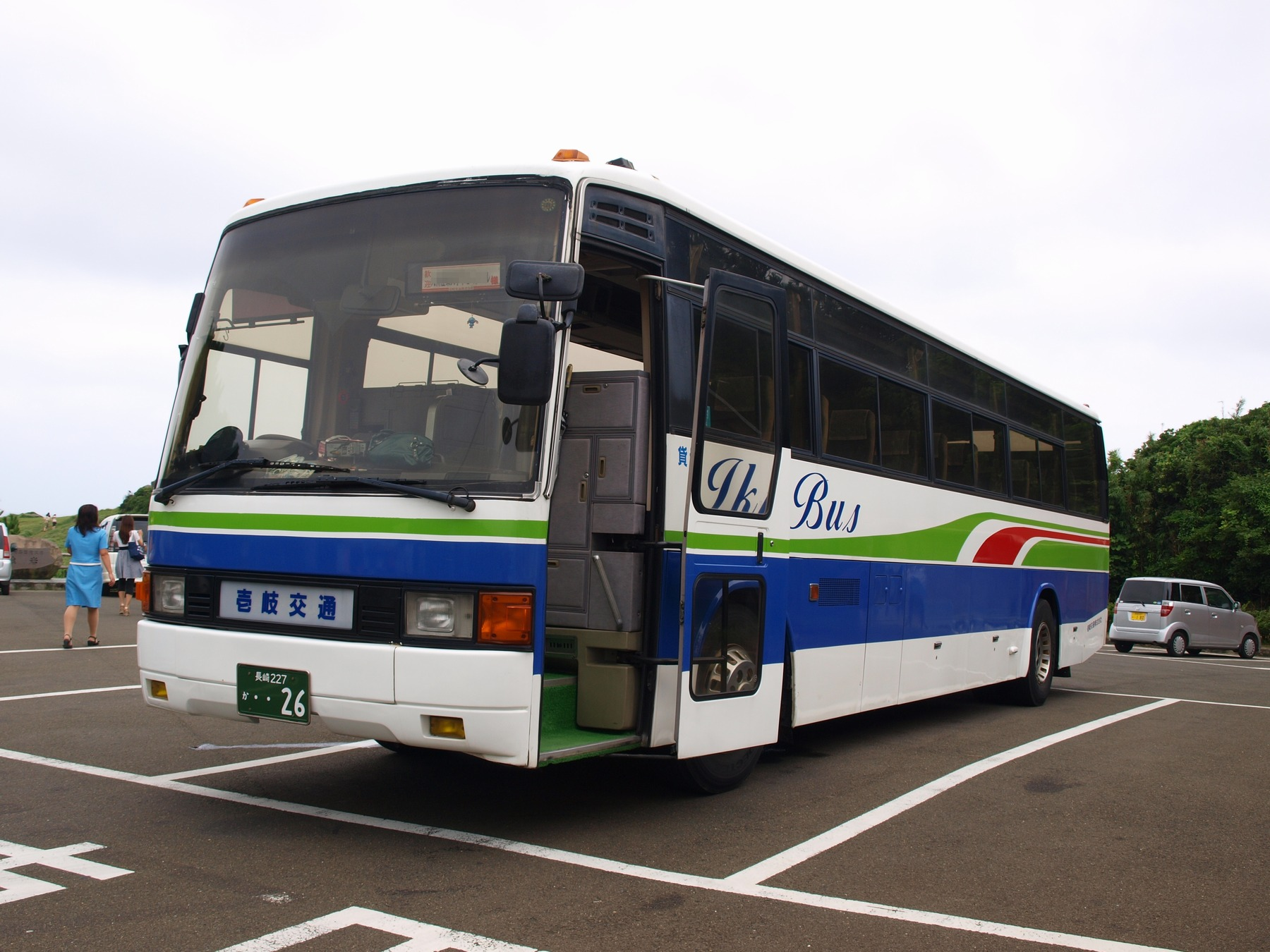 長崎県壱岐市を走る壱岐交通の貸し切り専用車。